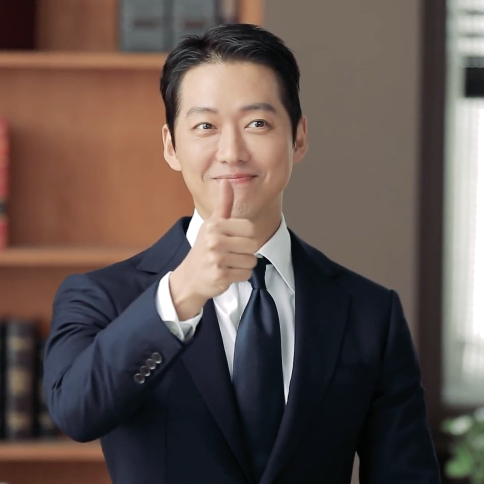 한국에너지공단 으뜸효율 홍보 영상을 찍는 남궁민